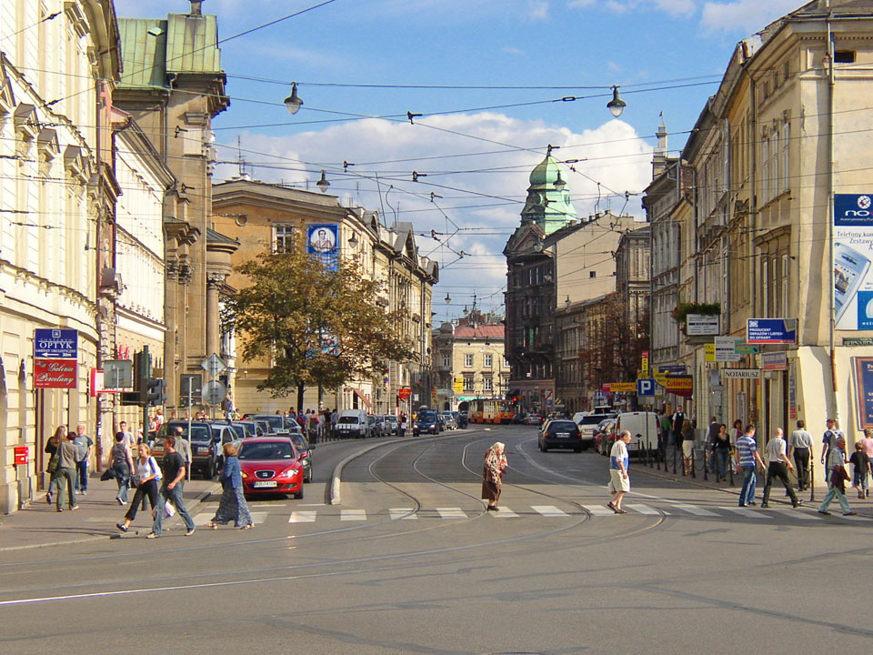 Ulica Stradomska w Krakowie. Widok od strony Wawelu.